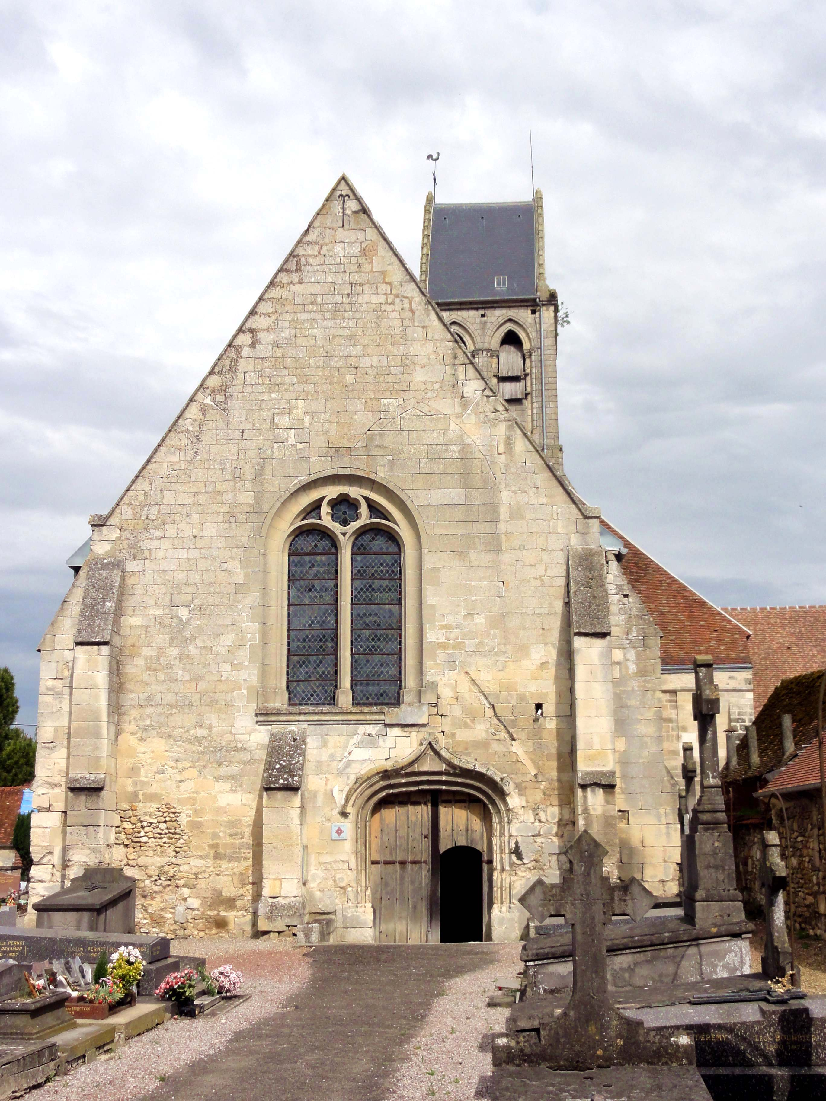 Vue depuis l'ouest.